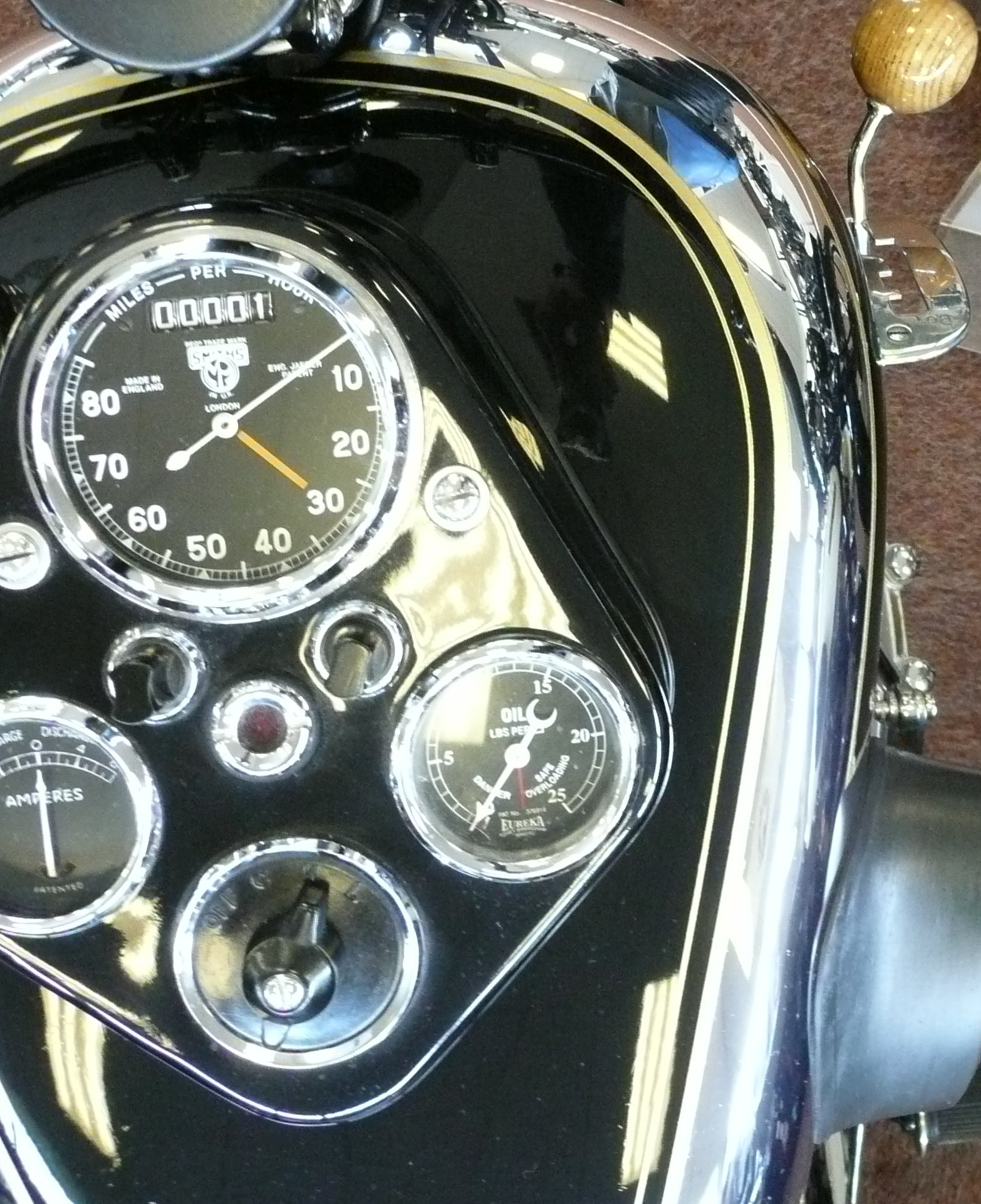 AJS S3 500 V-twin 1931 riders view